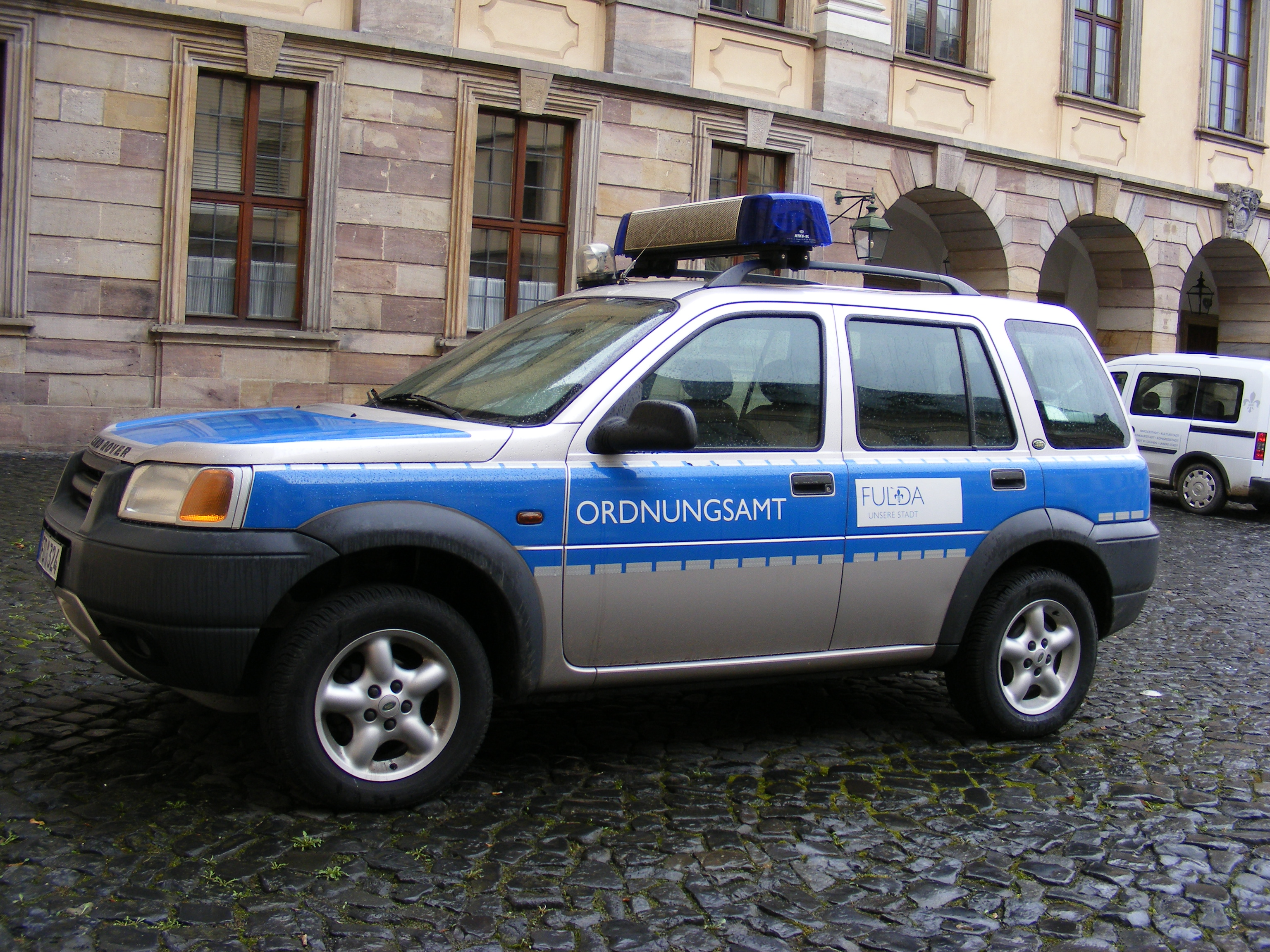 Stadt Fulda - Ordnungsamt, Land Rover Freelander